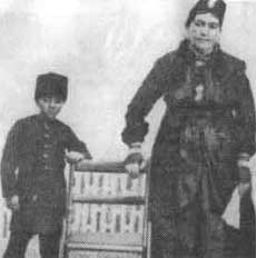 ملیجک، همدم ناصرالدین‌شاه از